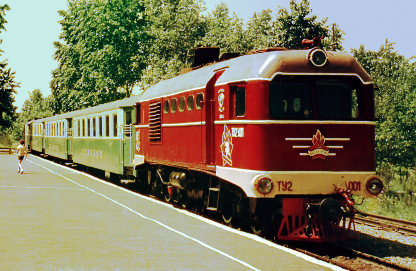 Малая Дальневосточная железная дорога, Хабаровск, 1983 год.